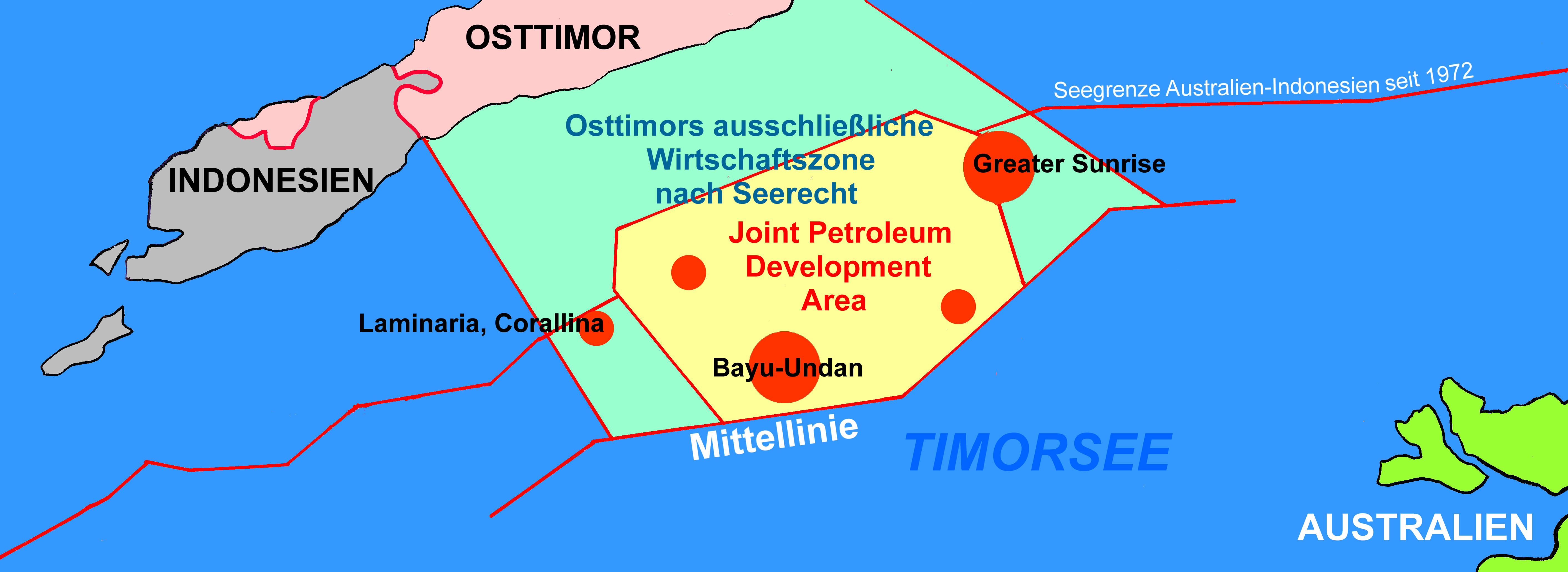 Grenzen der ausschließlichen Wirtschaftszone Osttimors nach Seerecht in der Timorsee und der Joint Petroleum Development Area nach dem Timor Sea Treaty. Außerdem sind die betroffenen Erdöl- und Erdgasfelder und die Seegrenze zwischen Indonesien und Australien nach dem Vertrag von 1972 eingezeichnet.